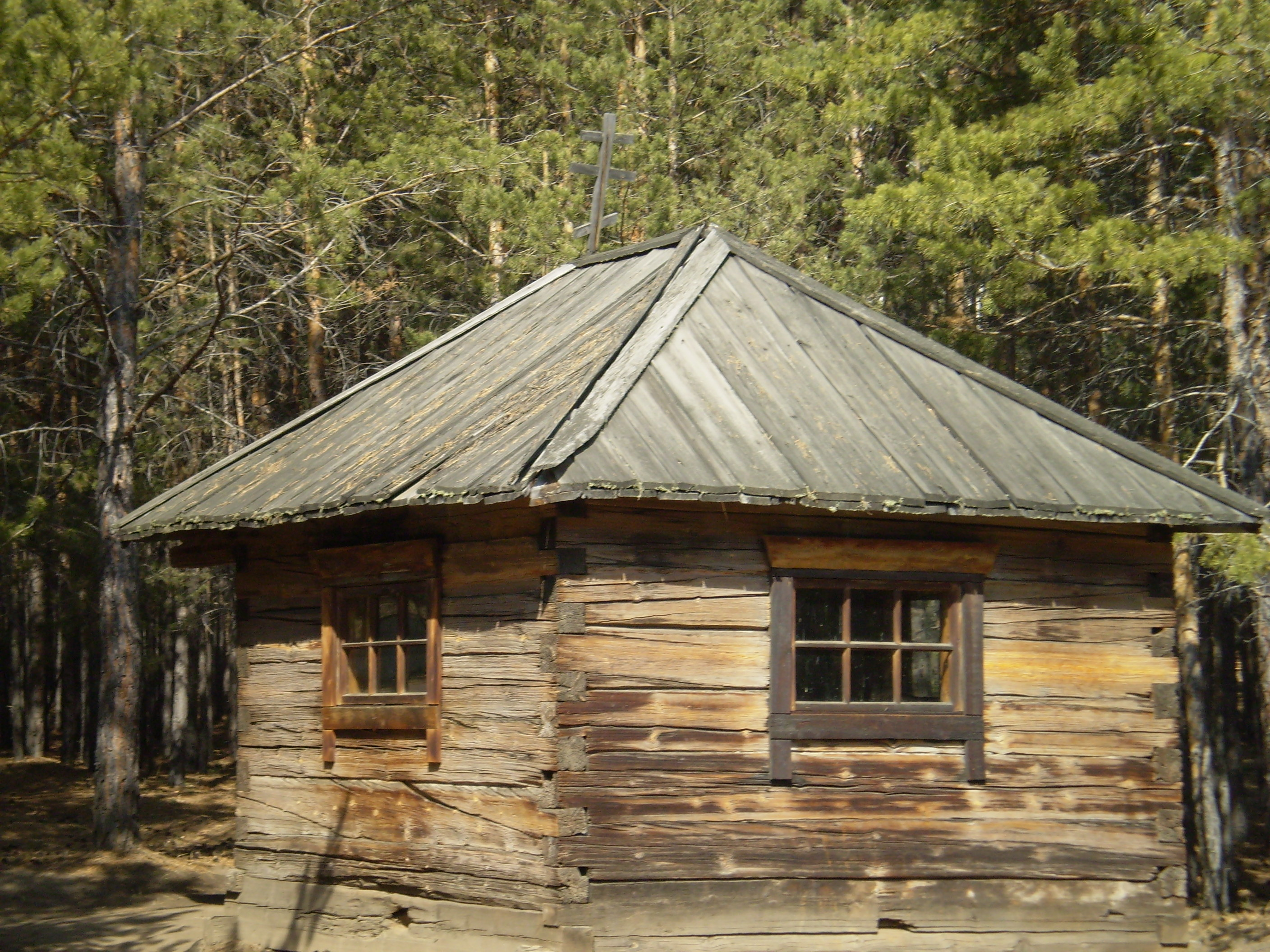 Старообрядческая часовня в этнографическом музее народов Забайкалья. Улан-Уде